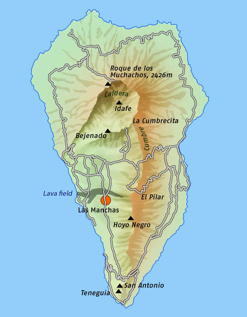 La Palma map, mountains